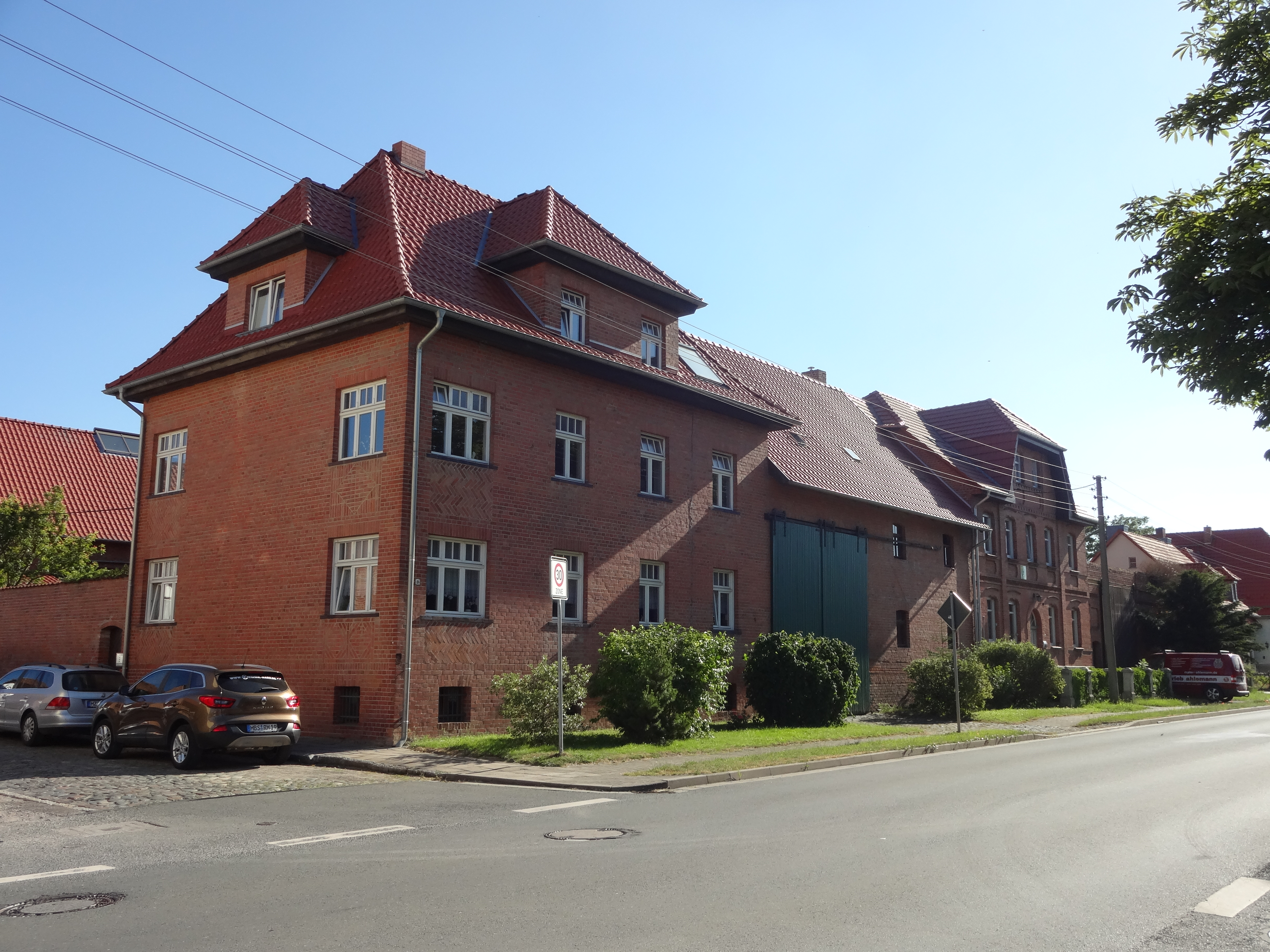 denkmalgeschütztes Bauernhaus in der Otto-Bethmann-Straße 9 in Harsleben